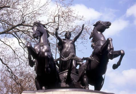 Statue de Boudica à Londres